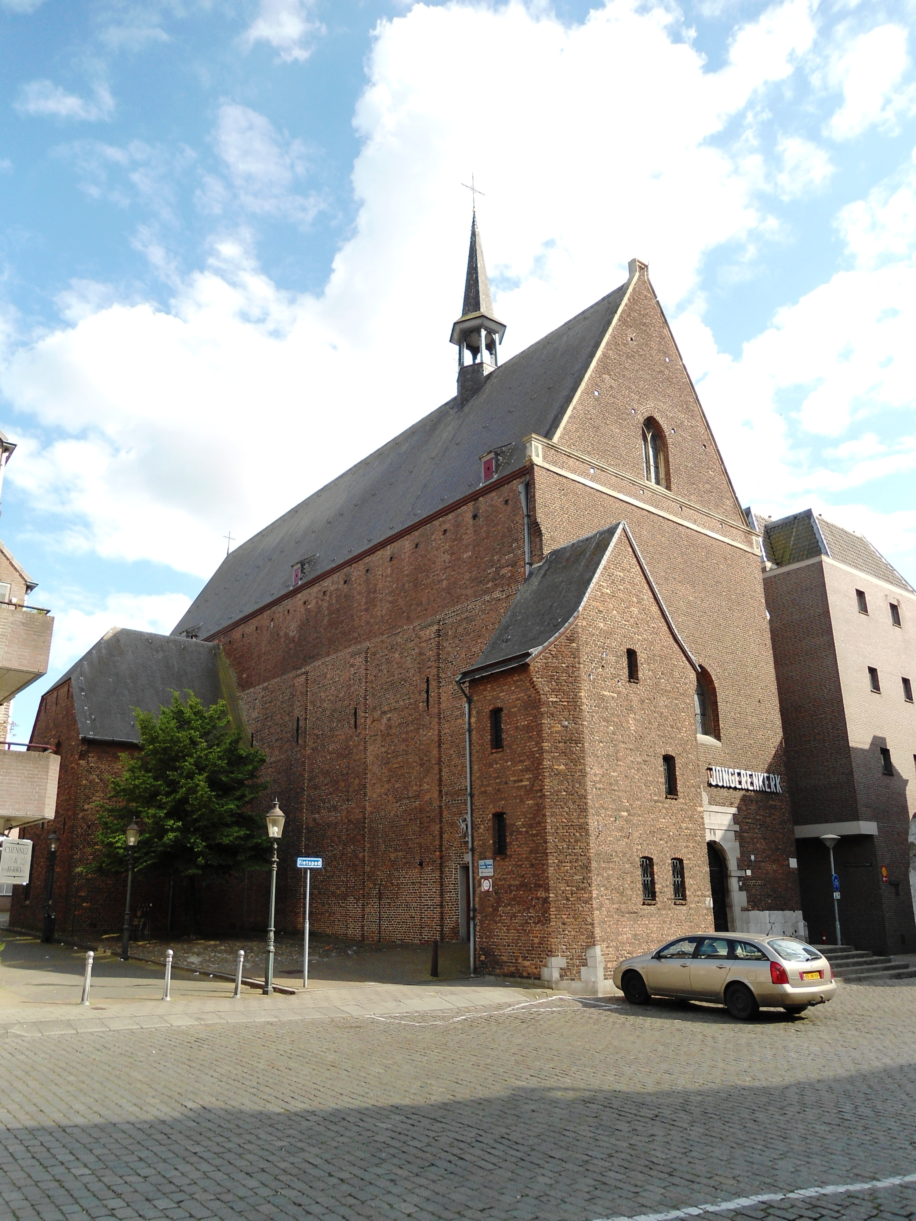 De westgevel van de Jongerenkerk